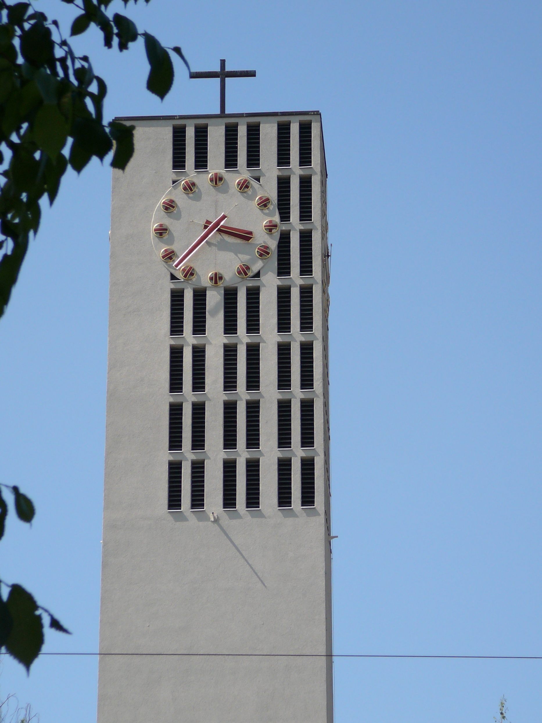 Römisch-katholische Kirche Maria Lourdes (Kirchturm)